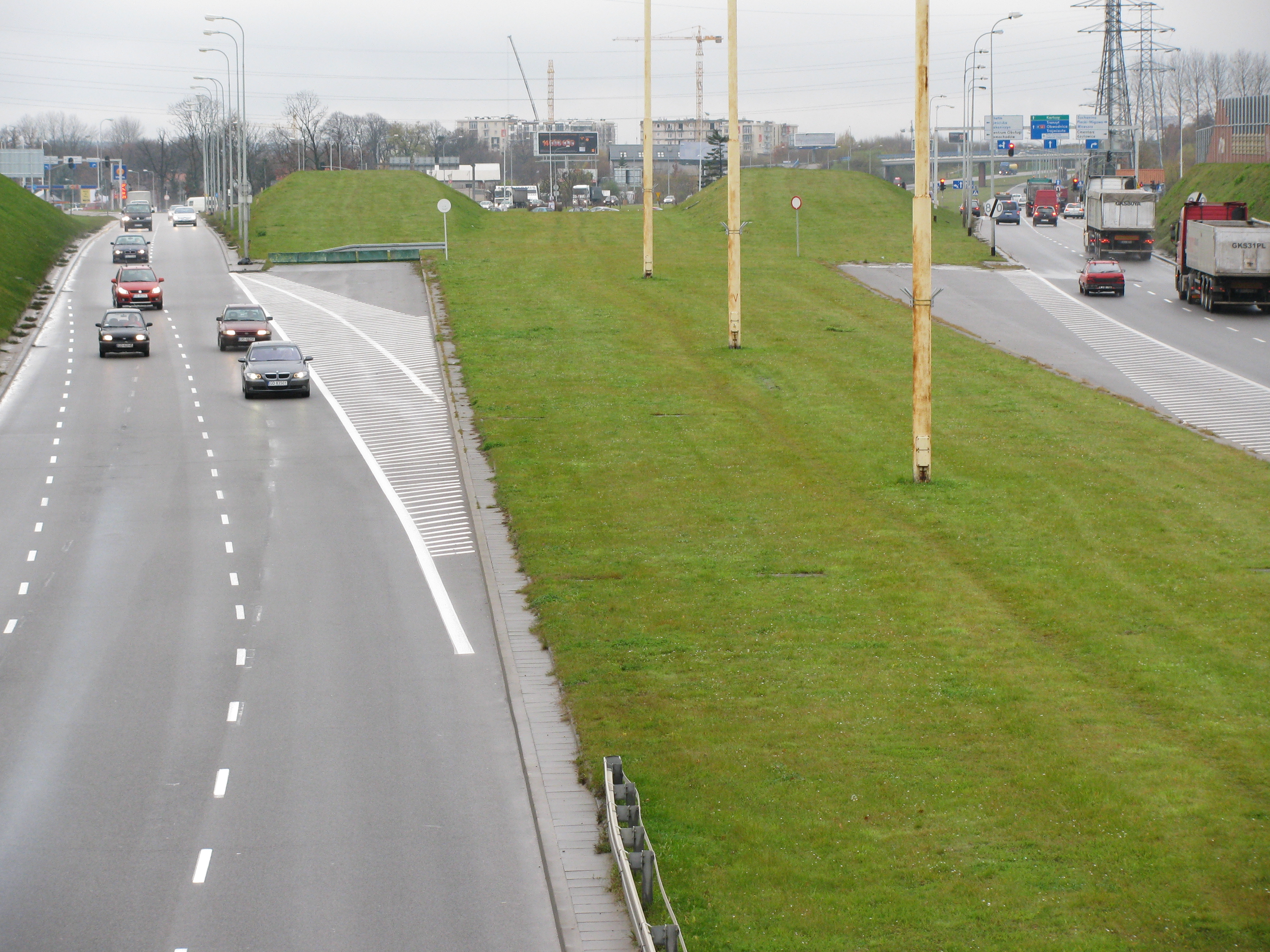 Trasa W-Z w Gdańsku, w tle skrzyżowanie z ul. Łostowicką. Widok w kierunku zachodnim.